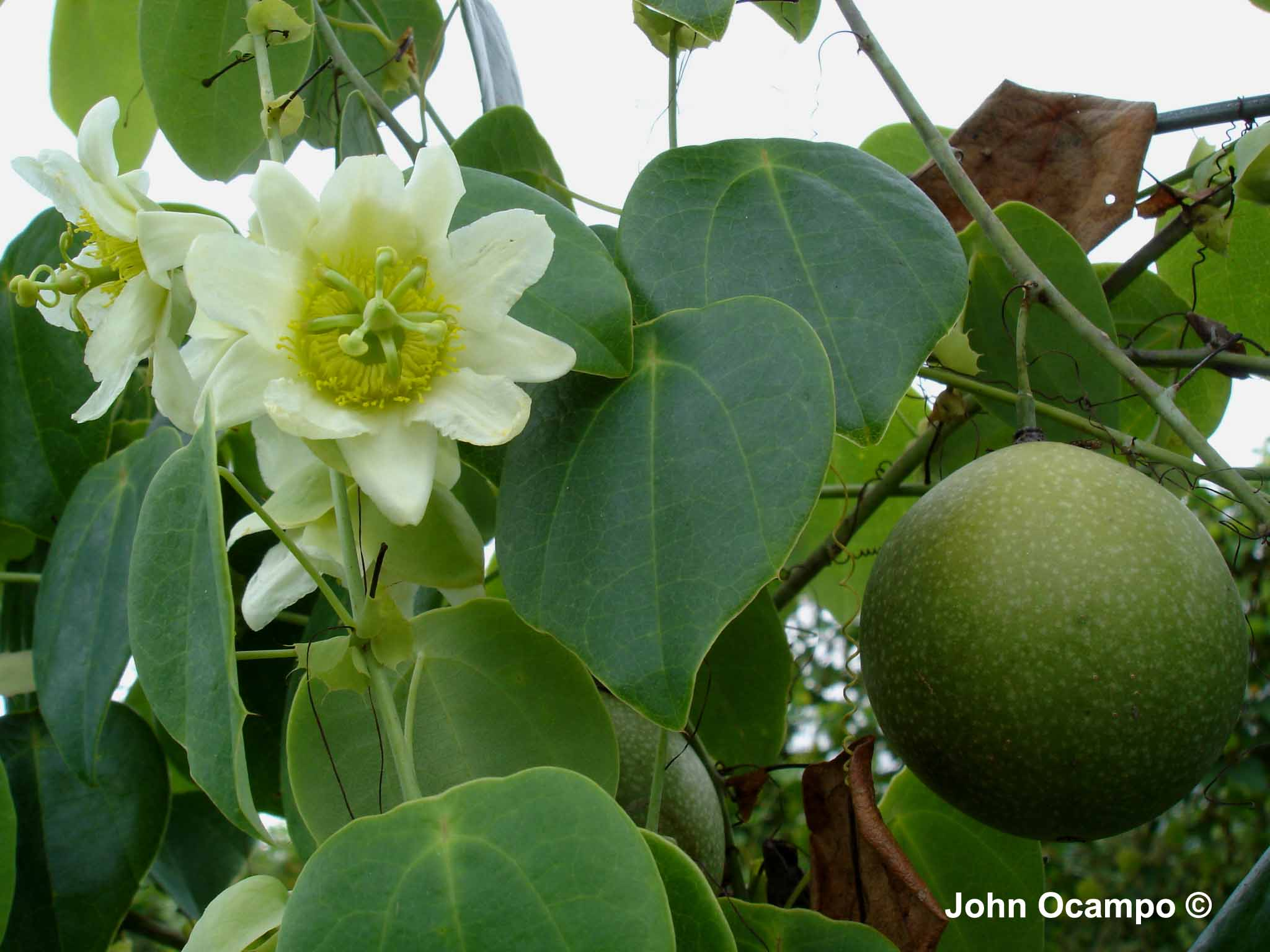 Passiflora guatemalensis S. Watson (Subgénero Decaloba). Fotografia tomada en Filadelfia, caldas (Colombia), especie muy cercana a P. hahnii.